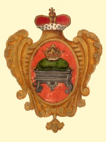 Тверь, герб (1730)